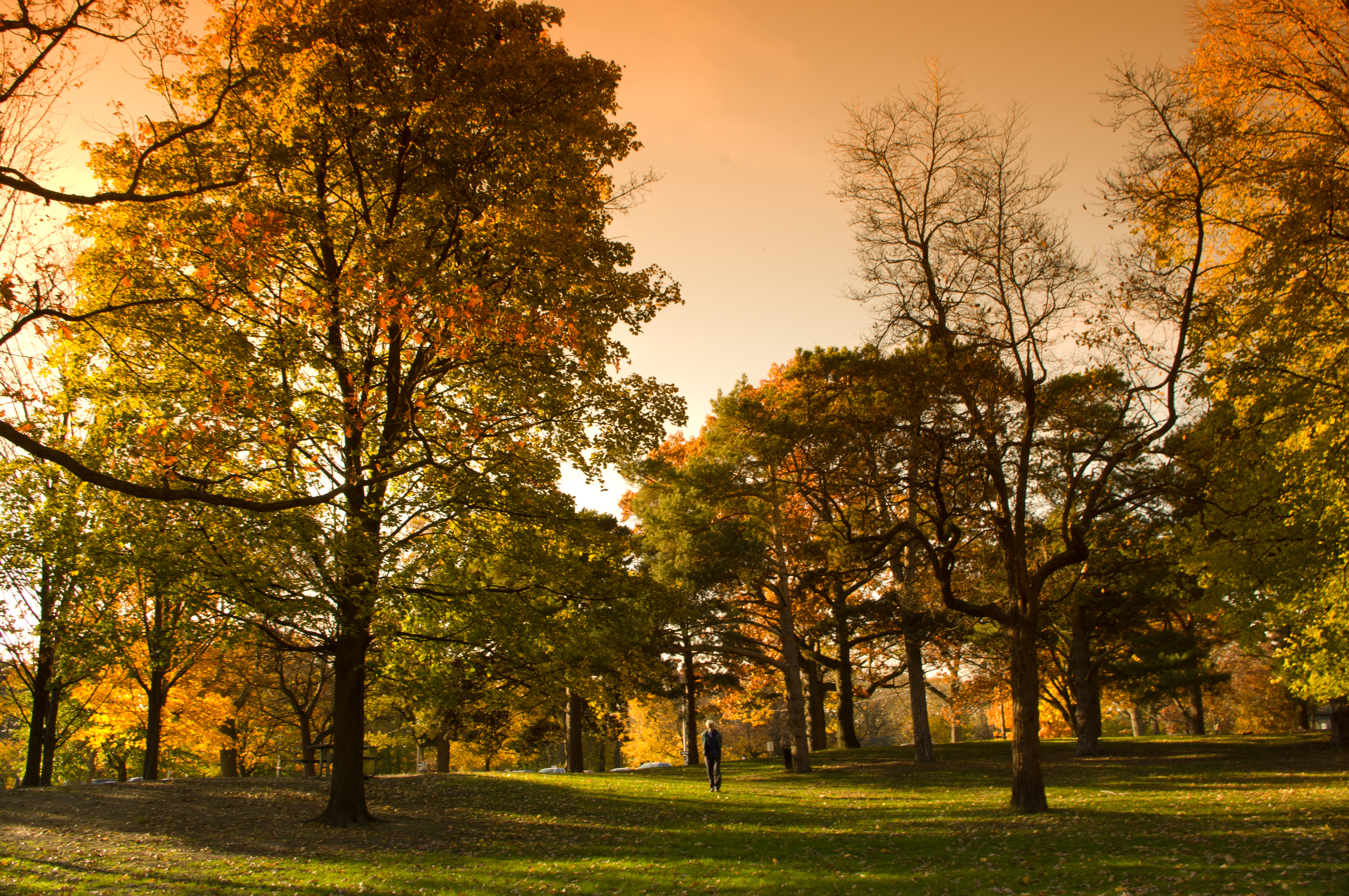 High Park autumn